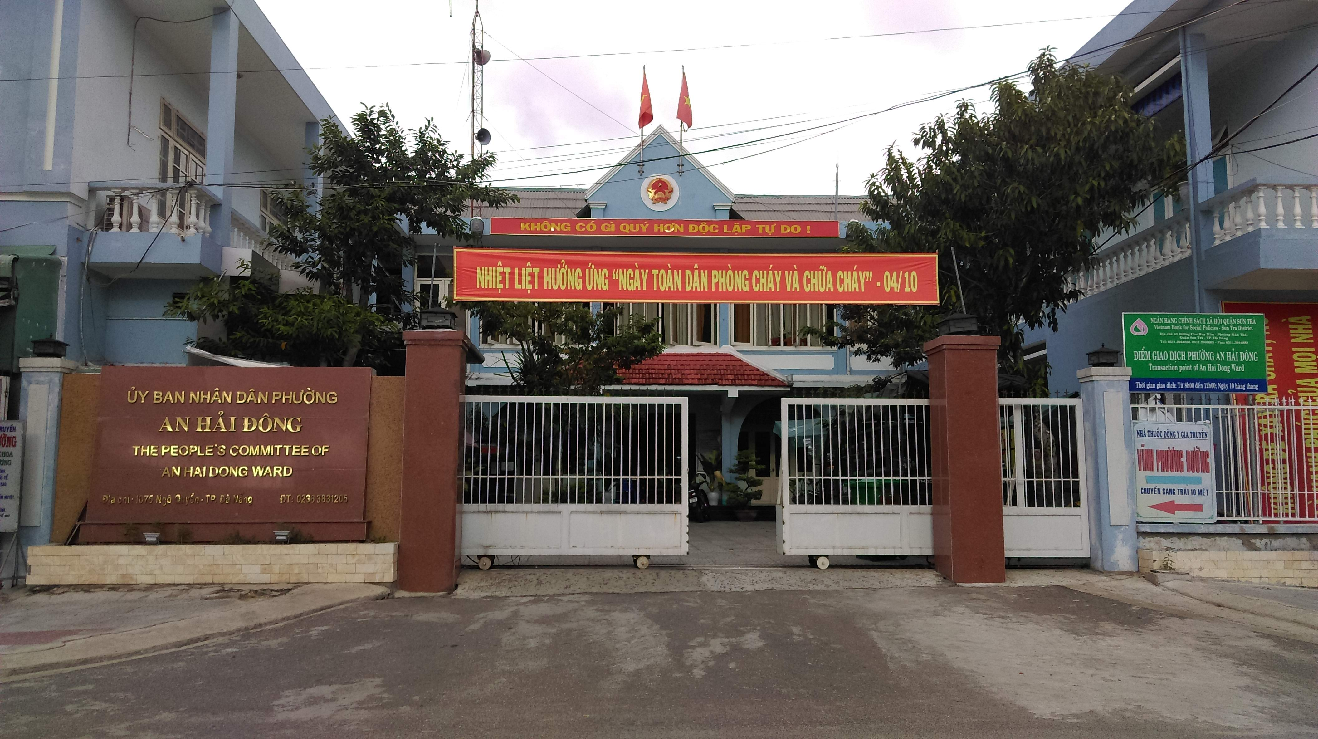 UBND phường An Hải Đông, Sơn Trà, Đà Nẵng